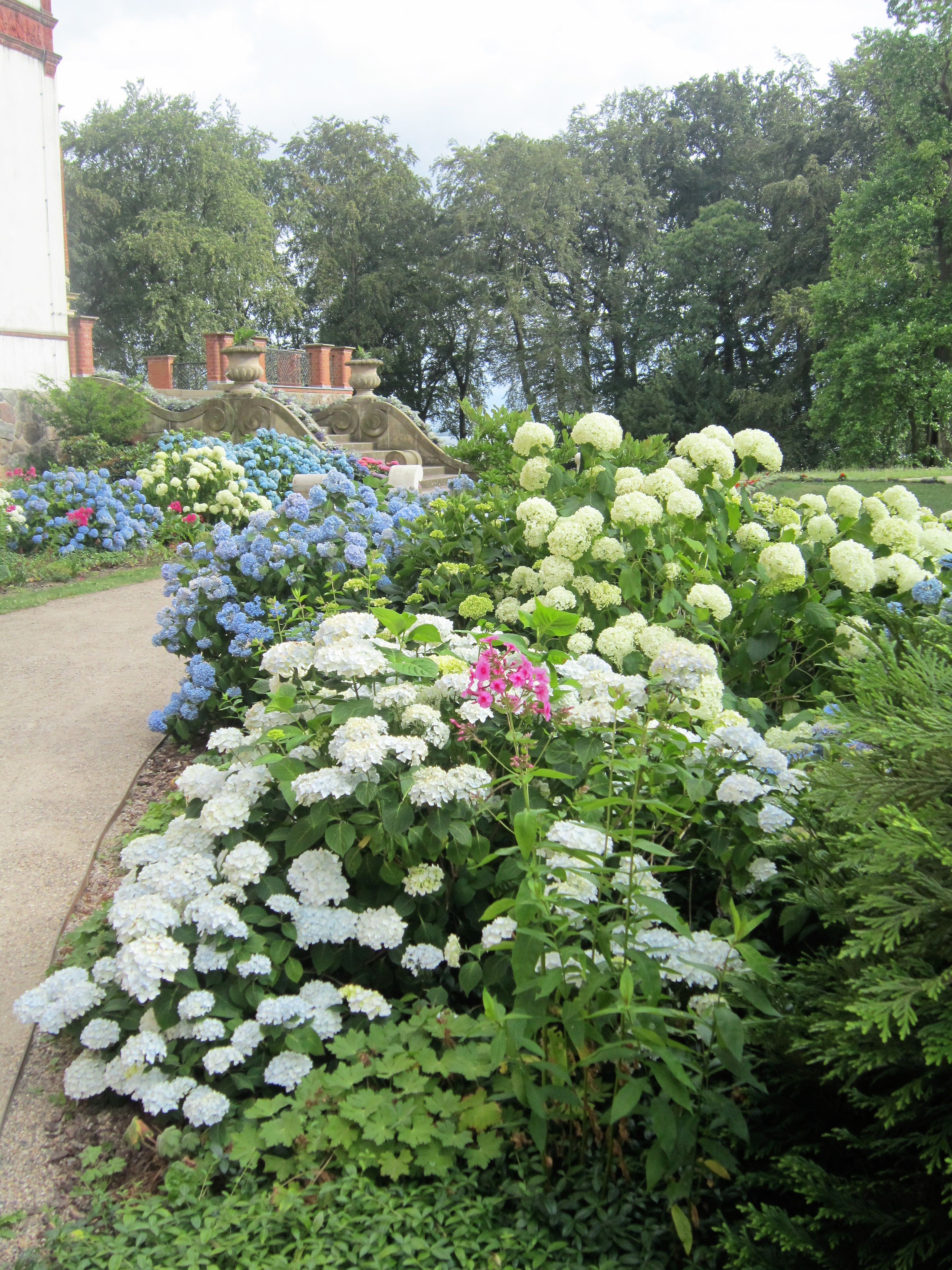 Trotz anhaltender Wasserknappheit im Sommer 2019 kraftvoll blühende Hortensien im Park des Schlosses Wiligrad am Schweriner Außensee